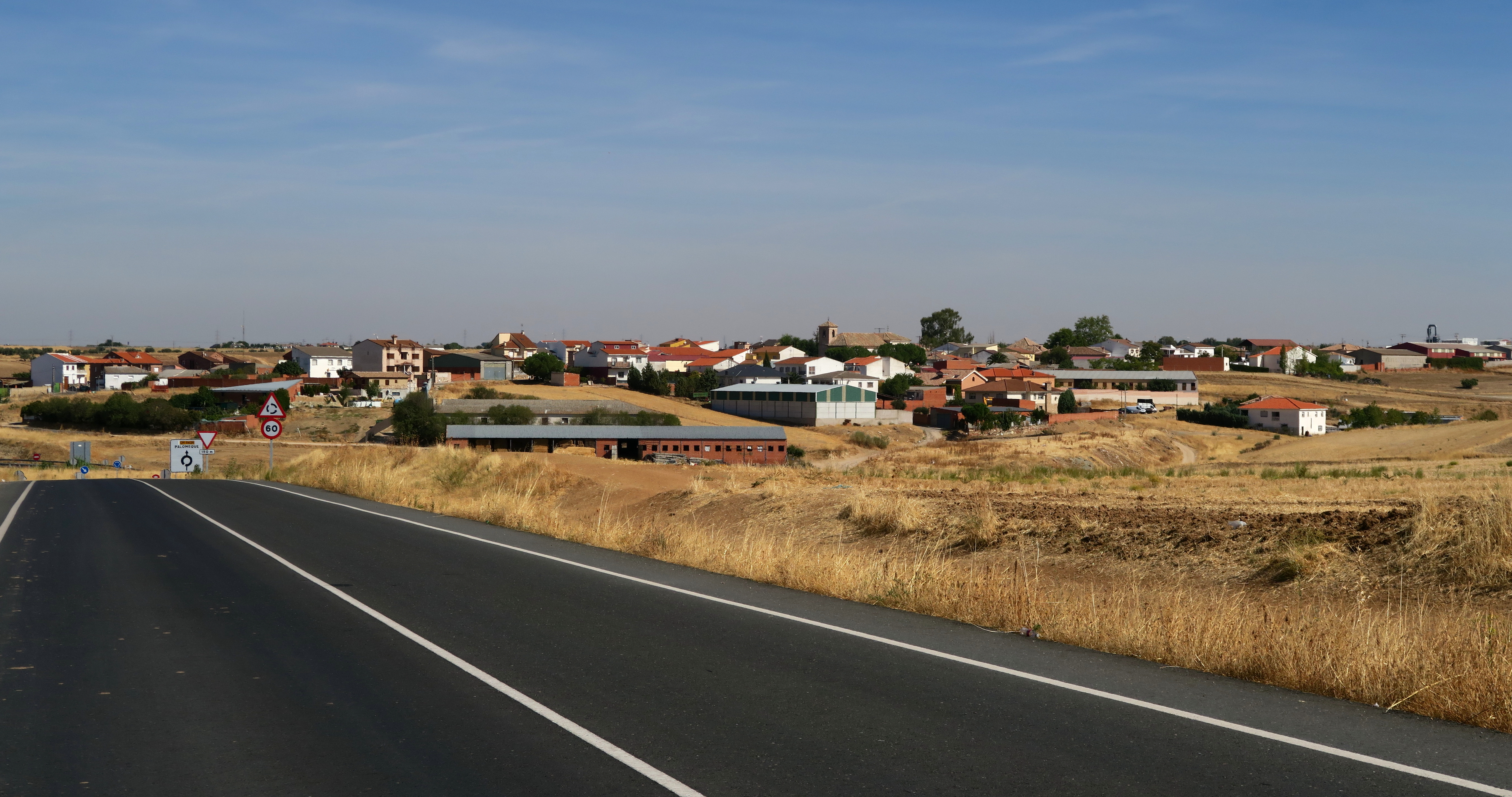 Palomeque desde CM-9421